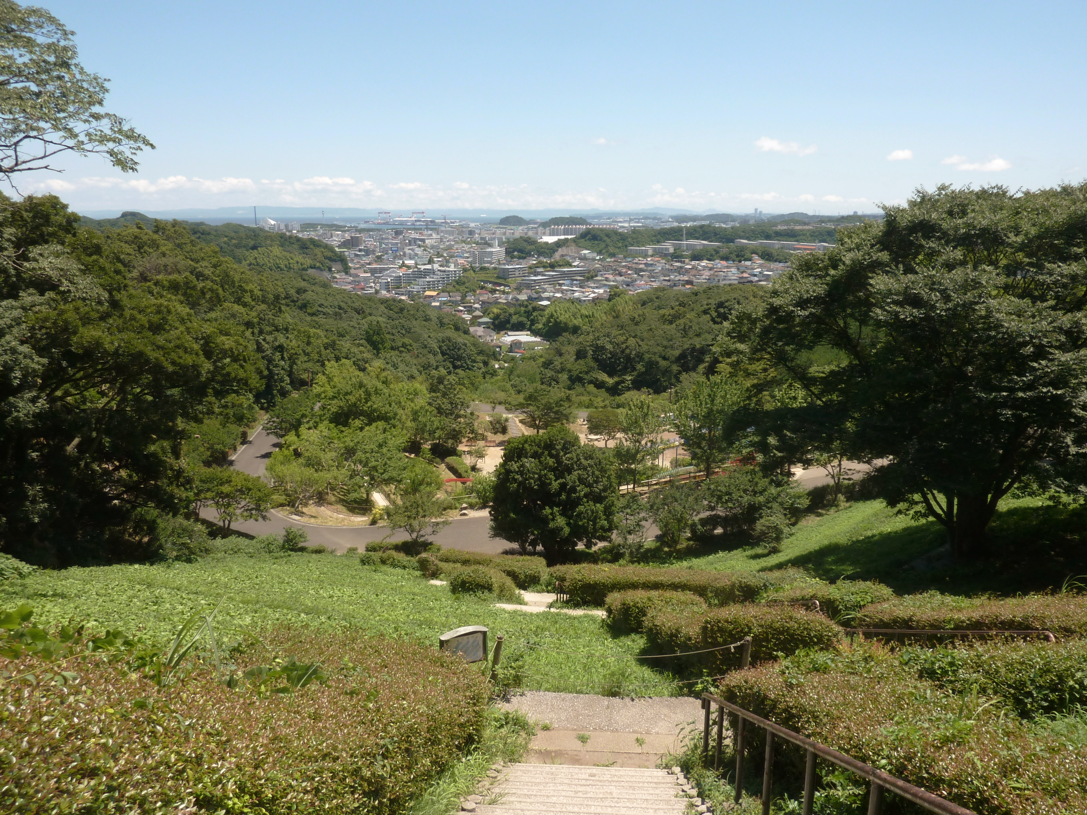 金沢自然公園の動物園夏山口付近から「こども広場」を臨む（神奈川県横浜市金沢区）